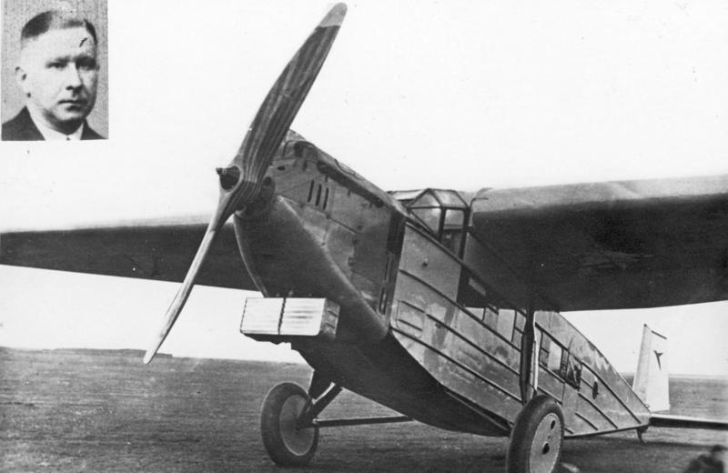 Schweres Flugzeugunglück bei Dresden. Das Verkehrsflugzeug der Strecke Berlin-Wien, das im Zentralflughafen Tempelhof fahrplanmässig gestartet war, ist kurz vor der Landung in Dresden abgestürzt, sämtliche 8 Insassen kamen ums Leben. [6.10.1930] Unser Bild zeigt die Messerschmidt-Type, zu der auch das verunglückte Verkehrsflugzeug D-1930 gehörte und den Piloten Erich Pust. Text ohne Gewähr!